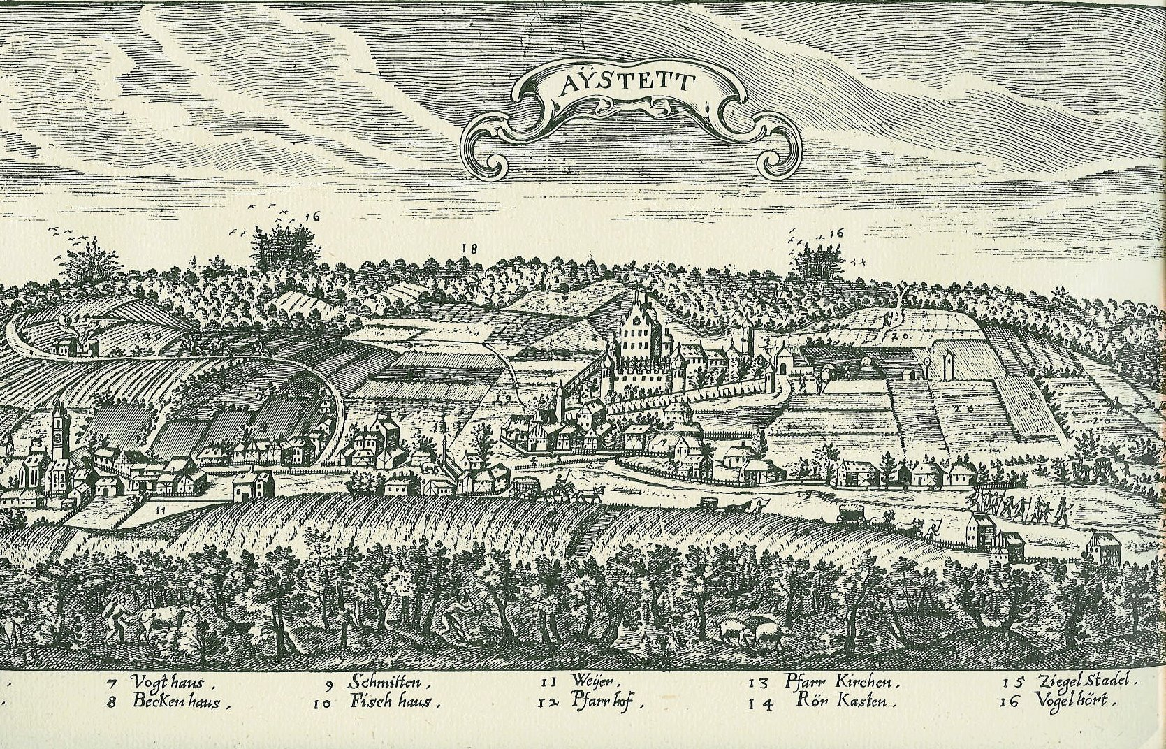 Schloss Aystetten in Aystetten , Stich von Raphael Custos